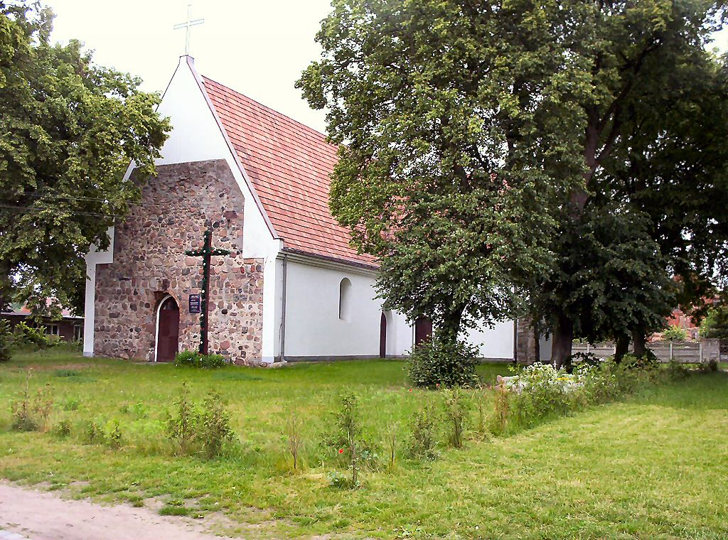 Ognica - rzymskokatolicki kościół filialny p.w. św. Jadwigi, XV, odbudowany po zniszczeniach wojennych 1978-1979